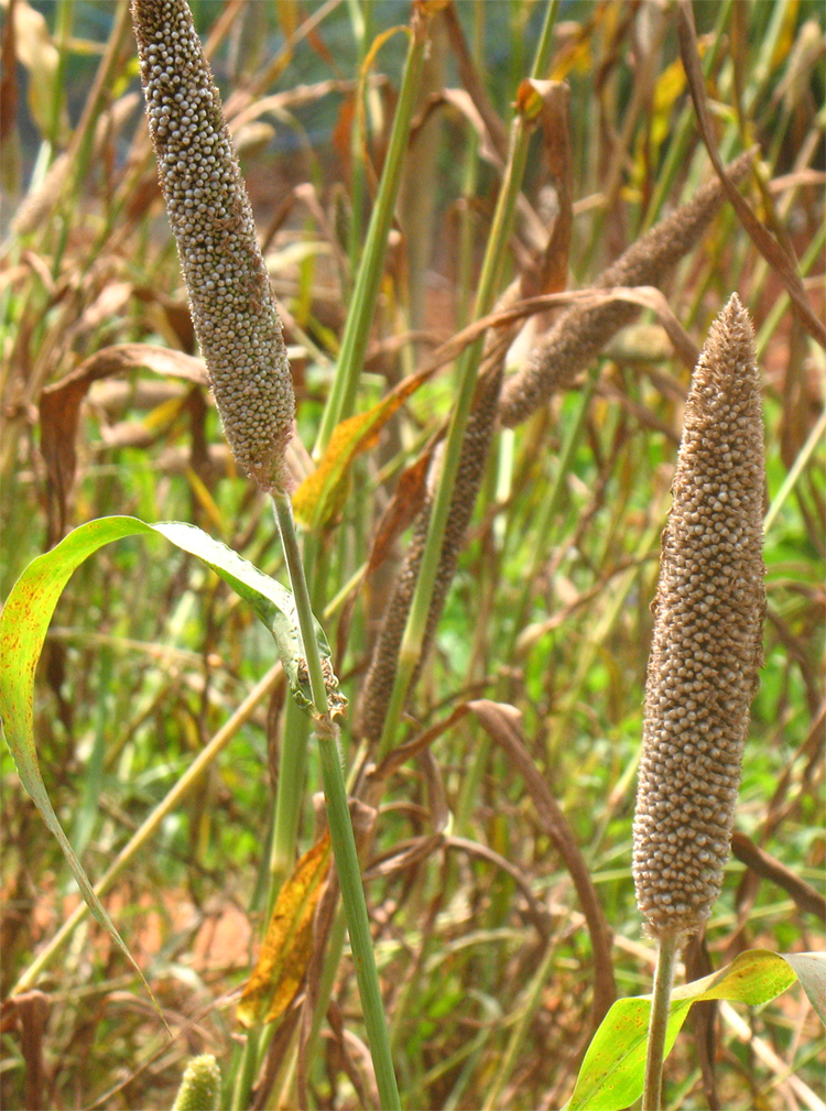 Pearl millet, Bajra /Bajri (Vellayani Agri. University, TVPM)